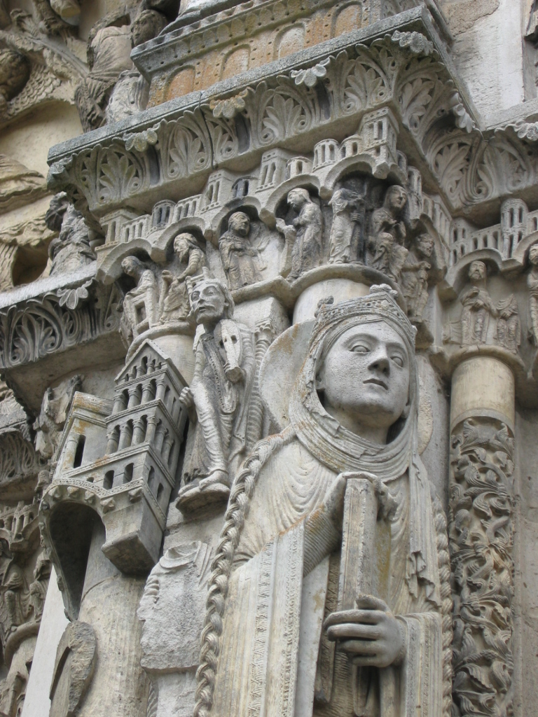 Cathédrale Notre-Dame de Chartres Reine de Juda Portail royal (XIIe s.)